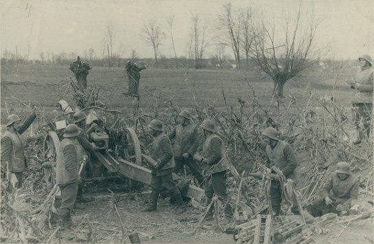 Военни от Шести артилерийски полк в бой при Дравасоболч.